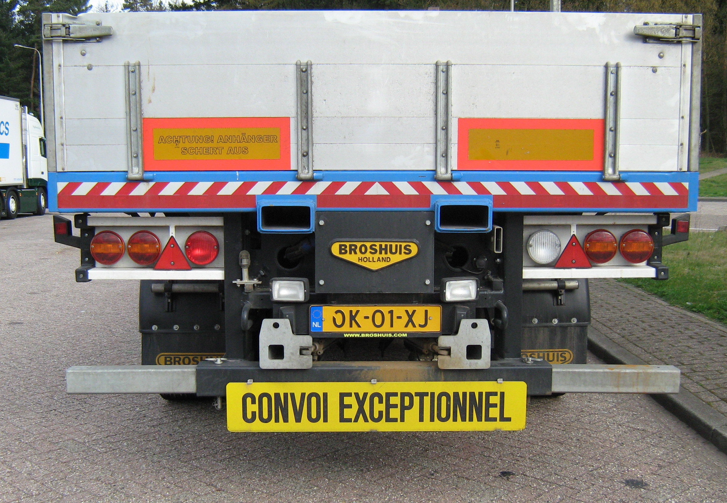 LKW-Sattelzug Rückseite für langen LKW mit Gabelstapler Vorichtung zum Anbauen